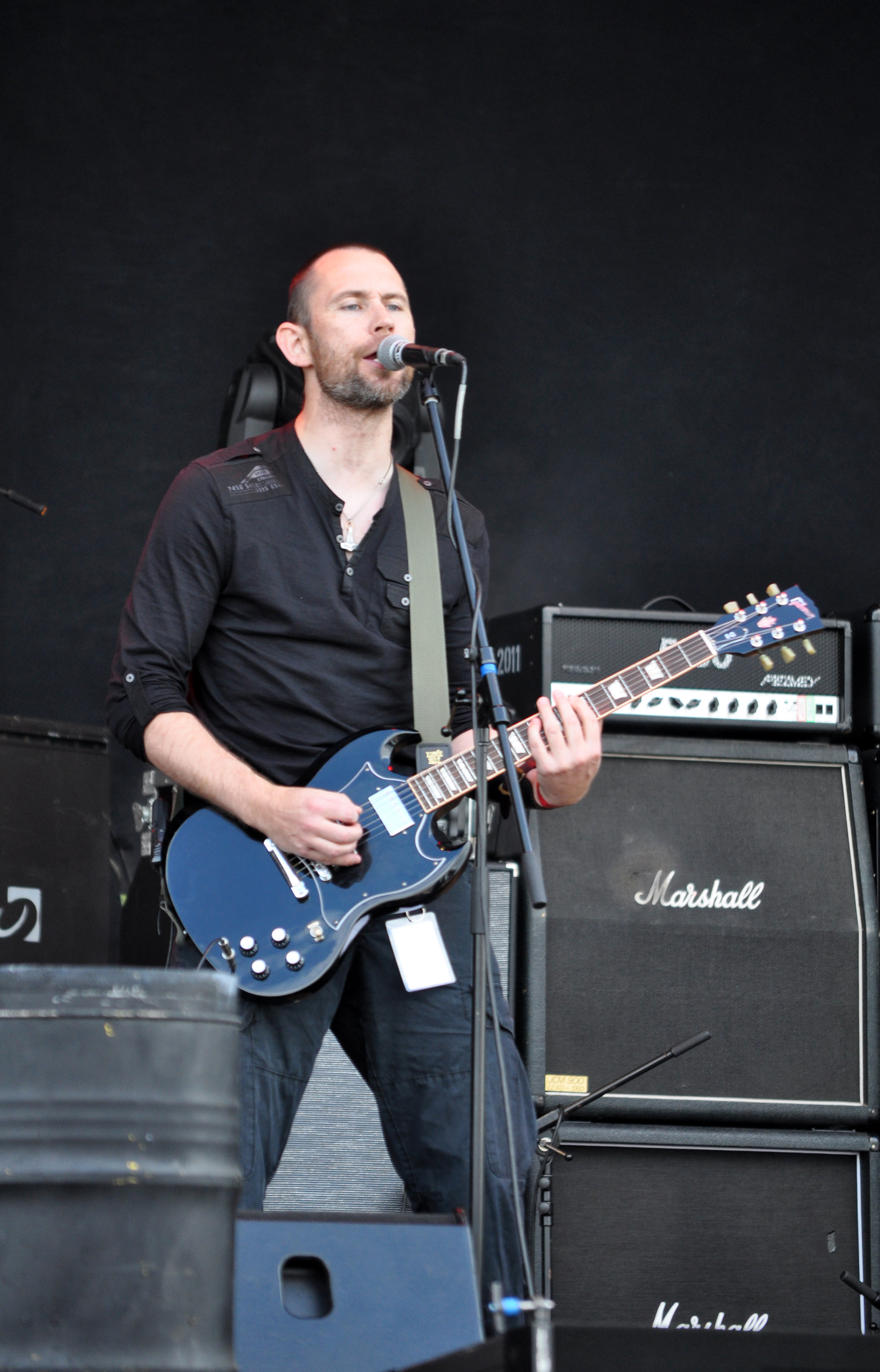 Skálmöld at Party.San Open Air 2012